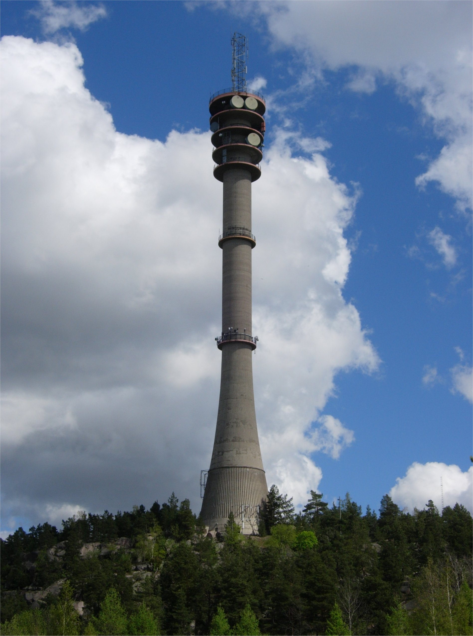 Pääskyvuoren linkkitorni